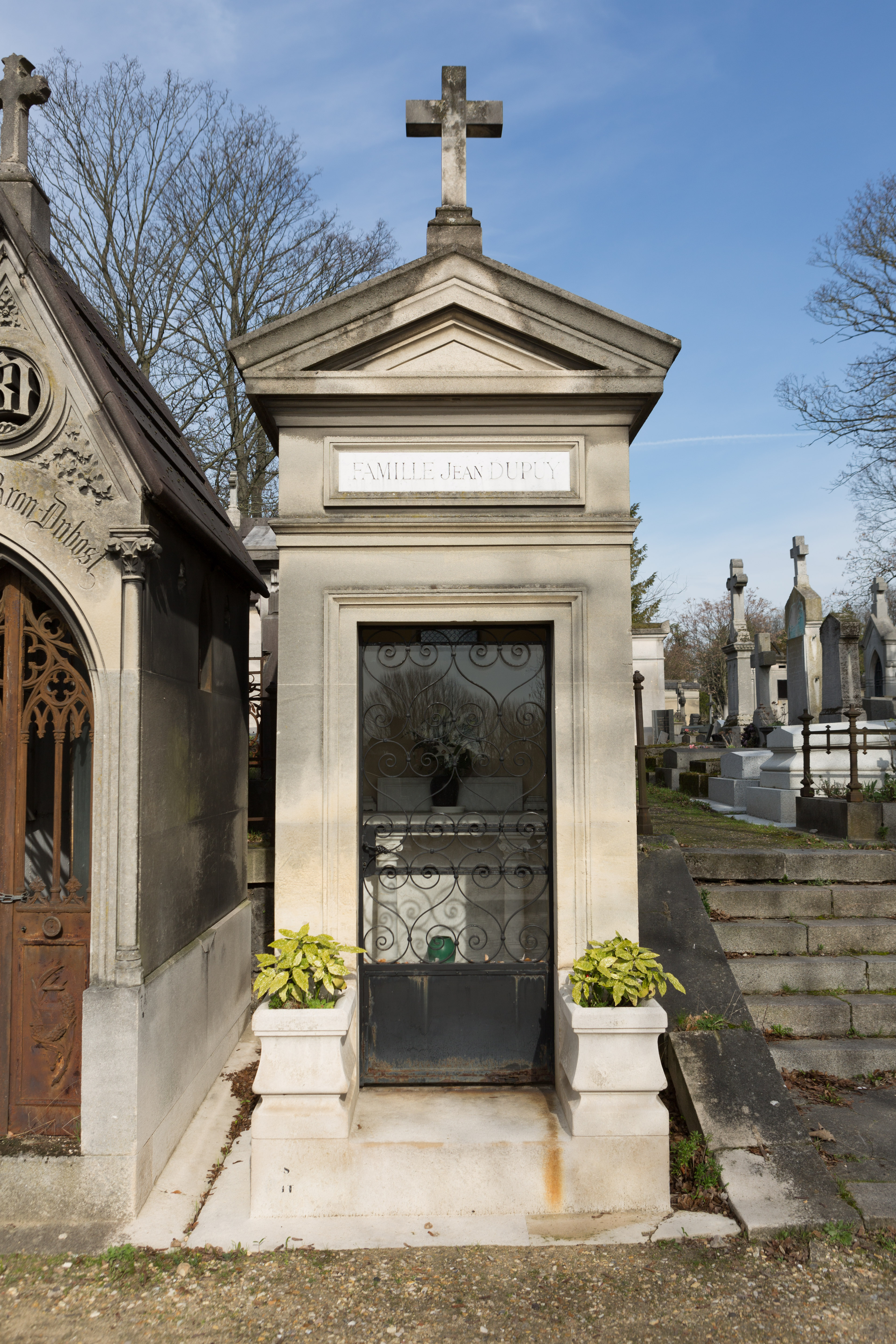 Sépulture de Jean Dupuy (1844-1919), homme politique (sénateur, ministre de l'Agriculture, ministre du Commerce et de l'Industrie, ministre des Travaux Publics, et ministre d'État) et patron de presse (directeur du Petit Parisien) ; Pierre Dupuy (1876-1968), son fils, homme politique et patron de presse ; François Arago (1862-1937), diplomate et député.